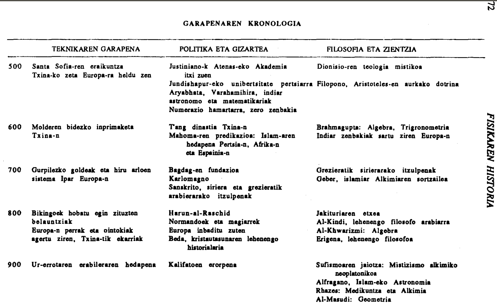 Taula, Fisikaren Historia (500-900). Jatorria: Fisikaren historia laburra, UEU, 1990